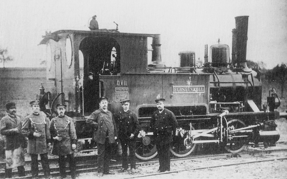 Dampflokomotive Bayerische D VII des Eröffnungszuges der Bahnstrecke Erlangen-Bruck–Herzogenaurach.